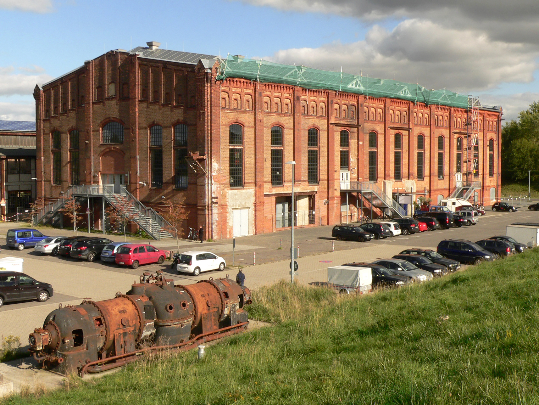 Denkmalgeschützte Gebläsehalle der Ilseder Hütte, davor denkmalgeschützte Ljungströmturbine